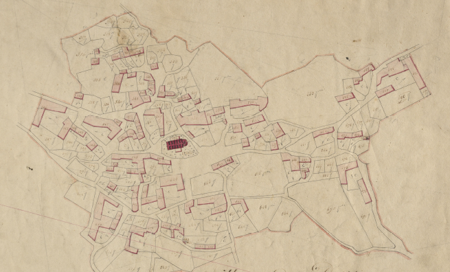 Mapa elaborat a partir d'un altre mapa de lliure disposició